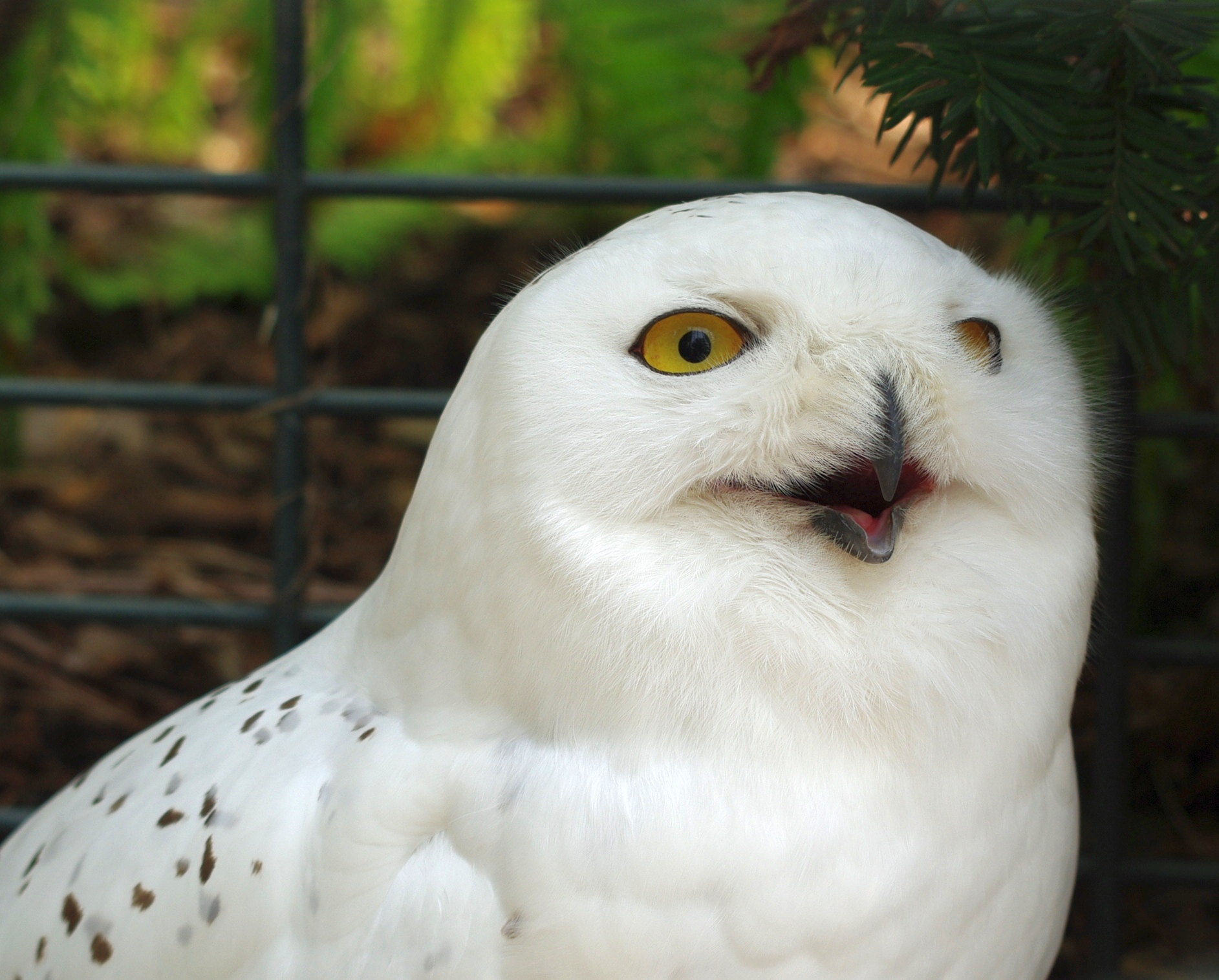 Schnee-Eule (Bubo scandiacus) Kopf eines Männchens, Stadtgarten Karlsruhe